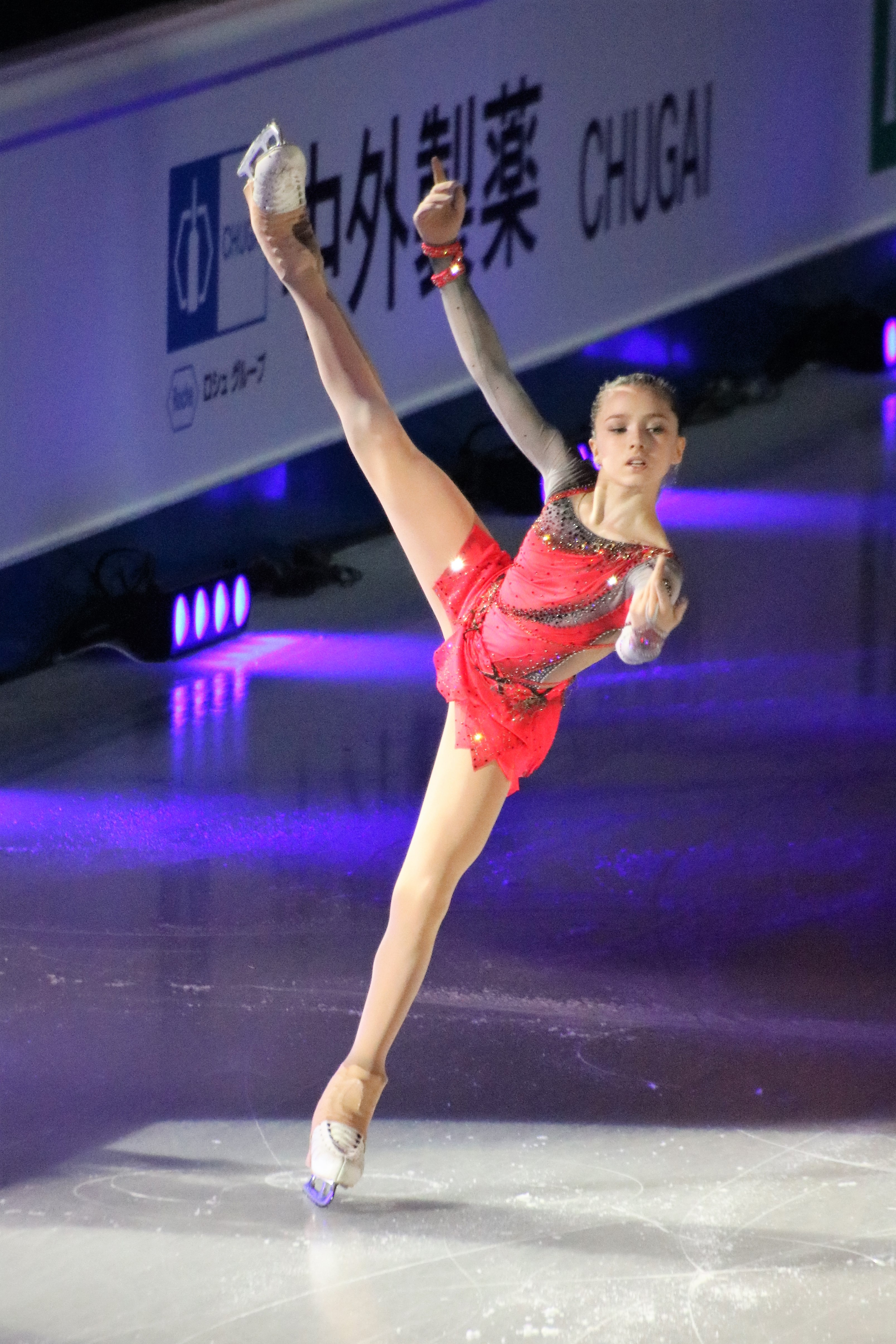 Камила Валиева (Россия) на финале юниорского Гран-при 2019-2020. Показательные выступления.